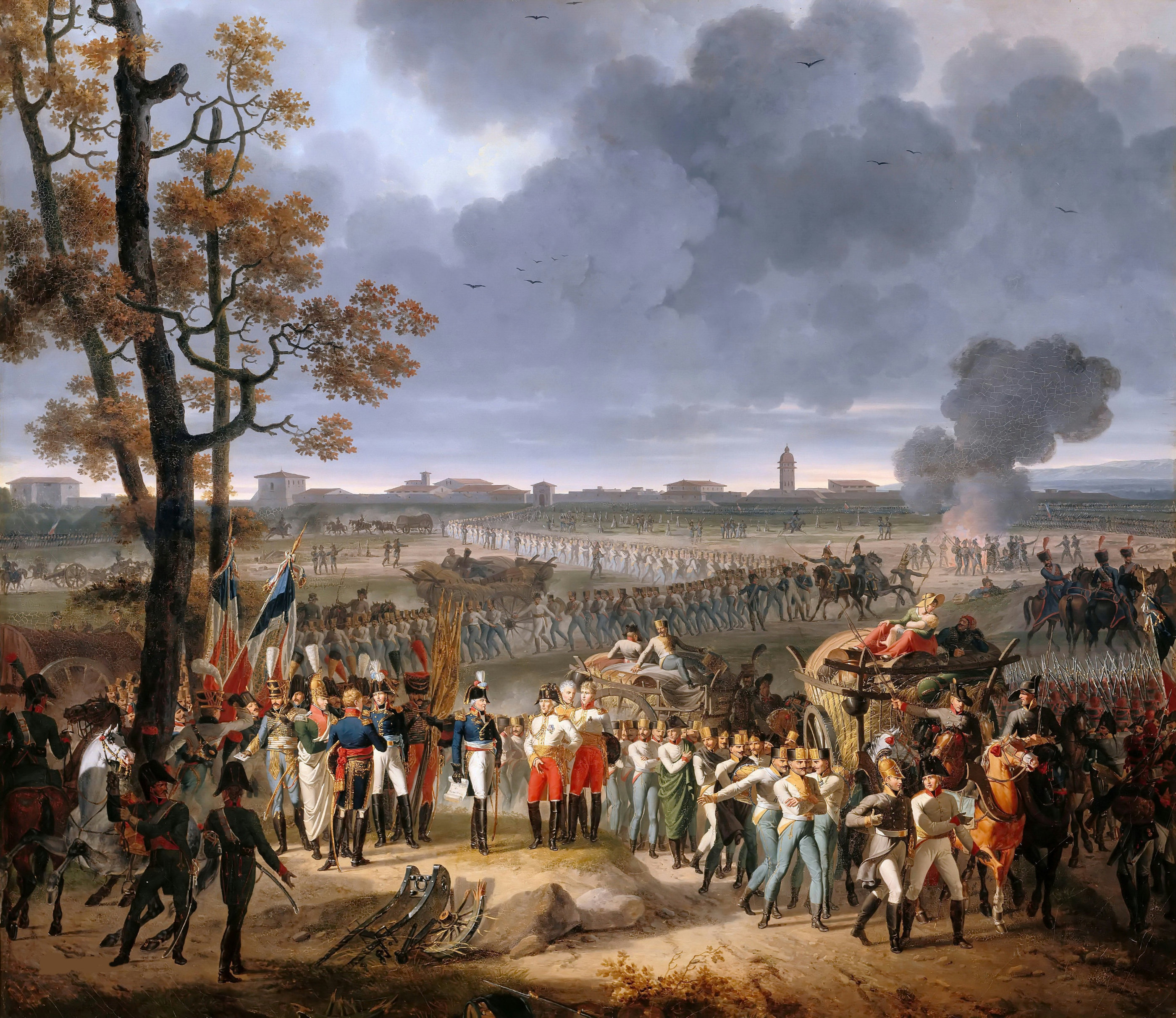 La reddition de Mantoue en février 1797 lors de la campagne d'Italie